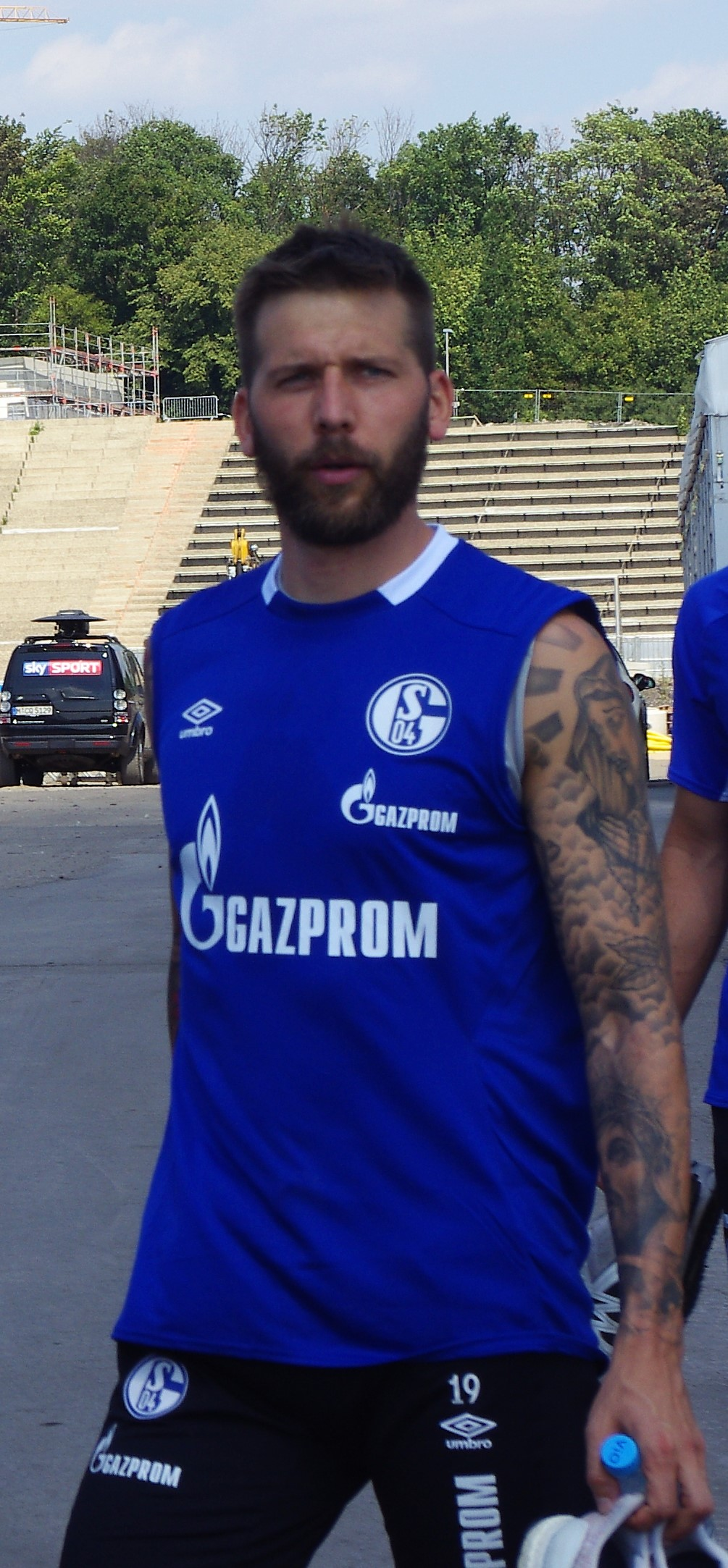 Guido Burgstaller 2019